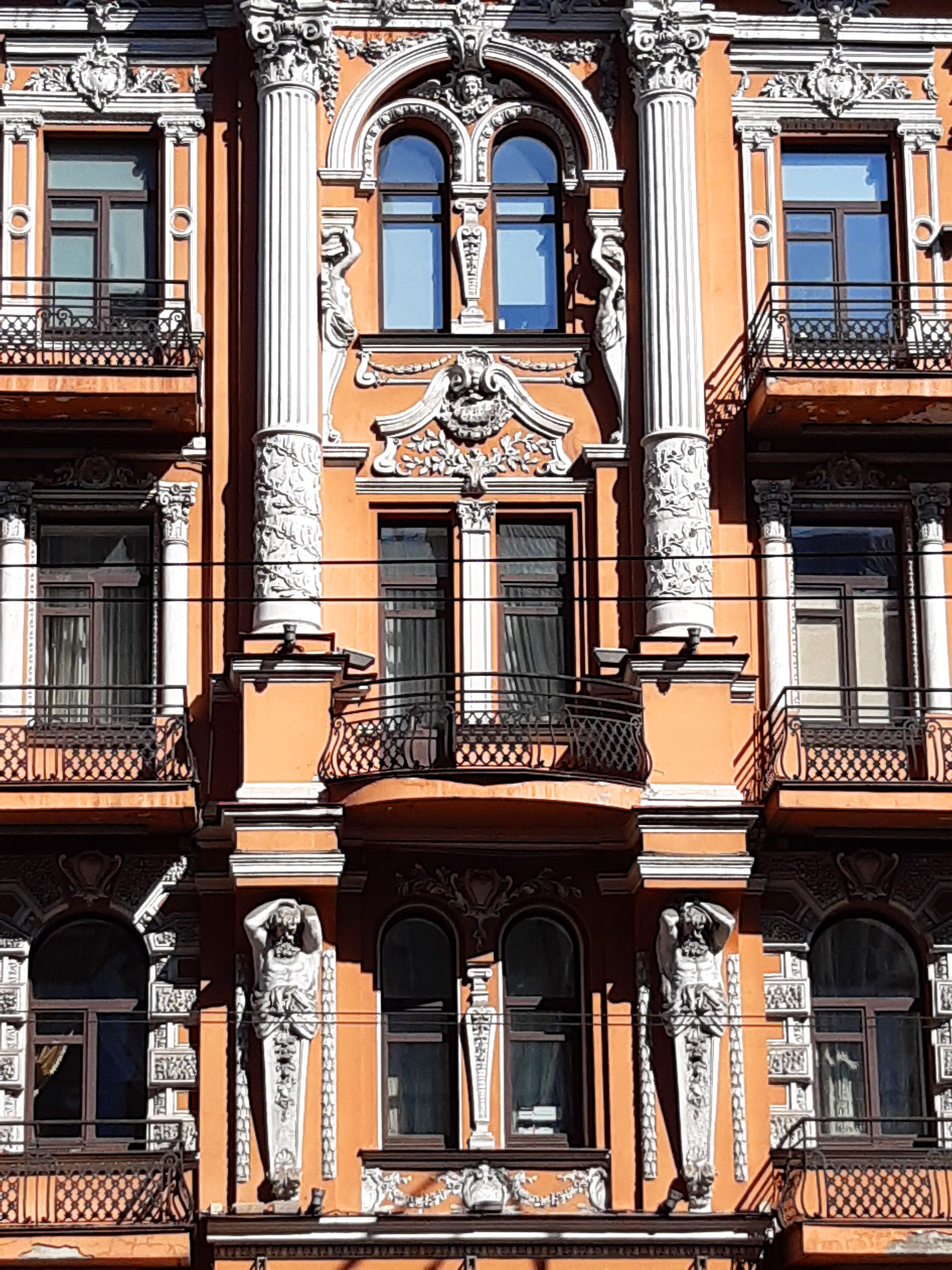 Фасад Будинок Клуга, вул. Саксаганського, 96, Київ